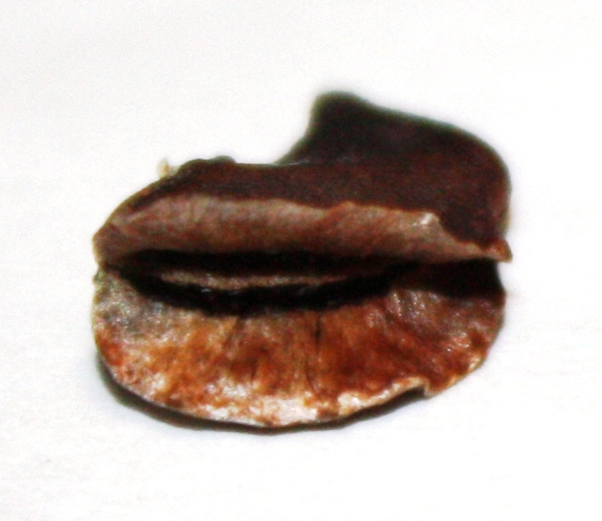 Banksia sessilis var cygnorum seed separator